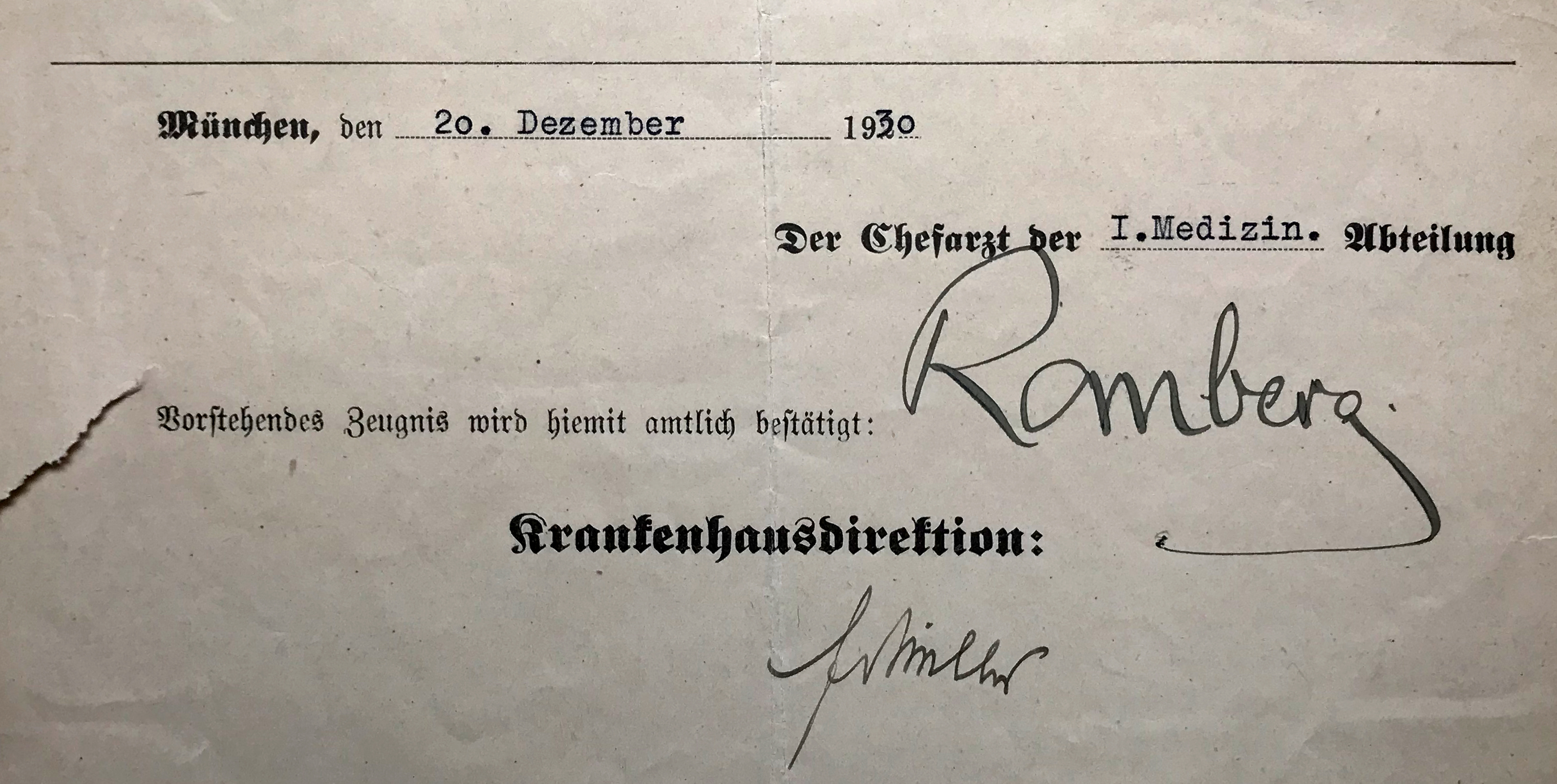 Unterschrift von Ernst von Romberg auf einem Dokument. Abfotografiert vom Original.